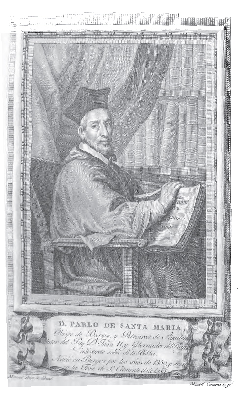 Retrato del prelado y escritor español Pablo de Santa María († 1435), que llegó a ser obispo de Cartagena y de Burgos. Fue sepultado en el desaparecido convento de San Pablo de Burgos, de la Orden de los dominicos.